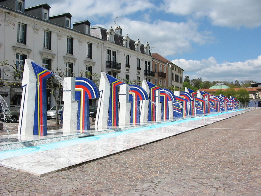 Contrexéville, Commune des Vosges. Place des Fontaines Architectes : Nicolas Normier et Jean Marie Hennin